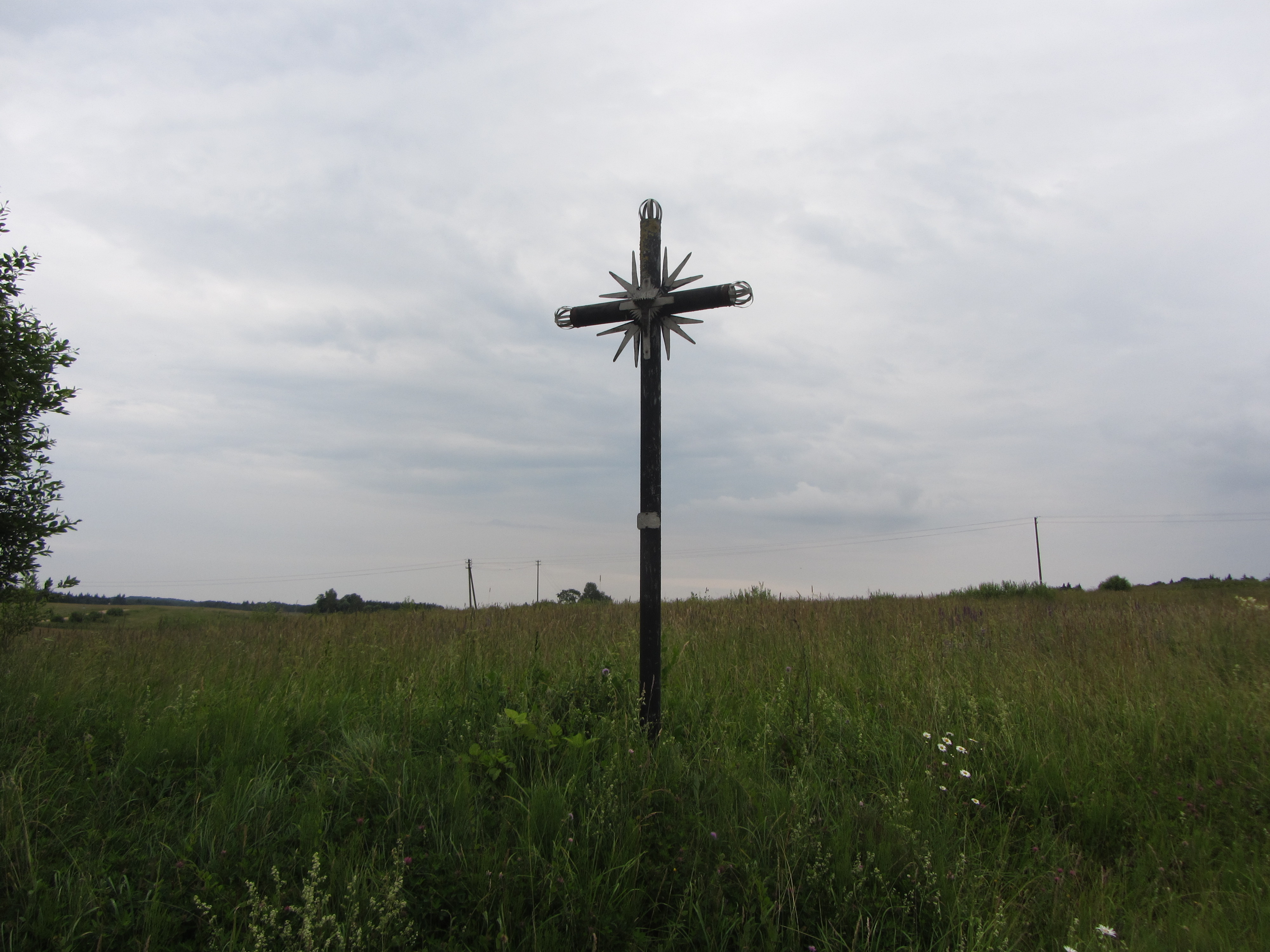 Kuktiškių sen., Lithuania